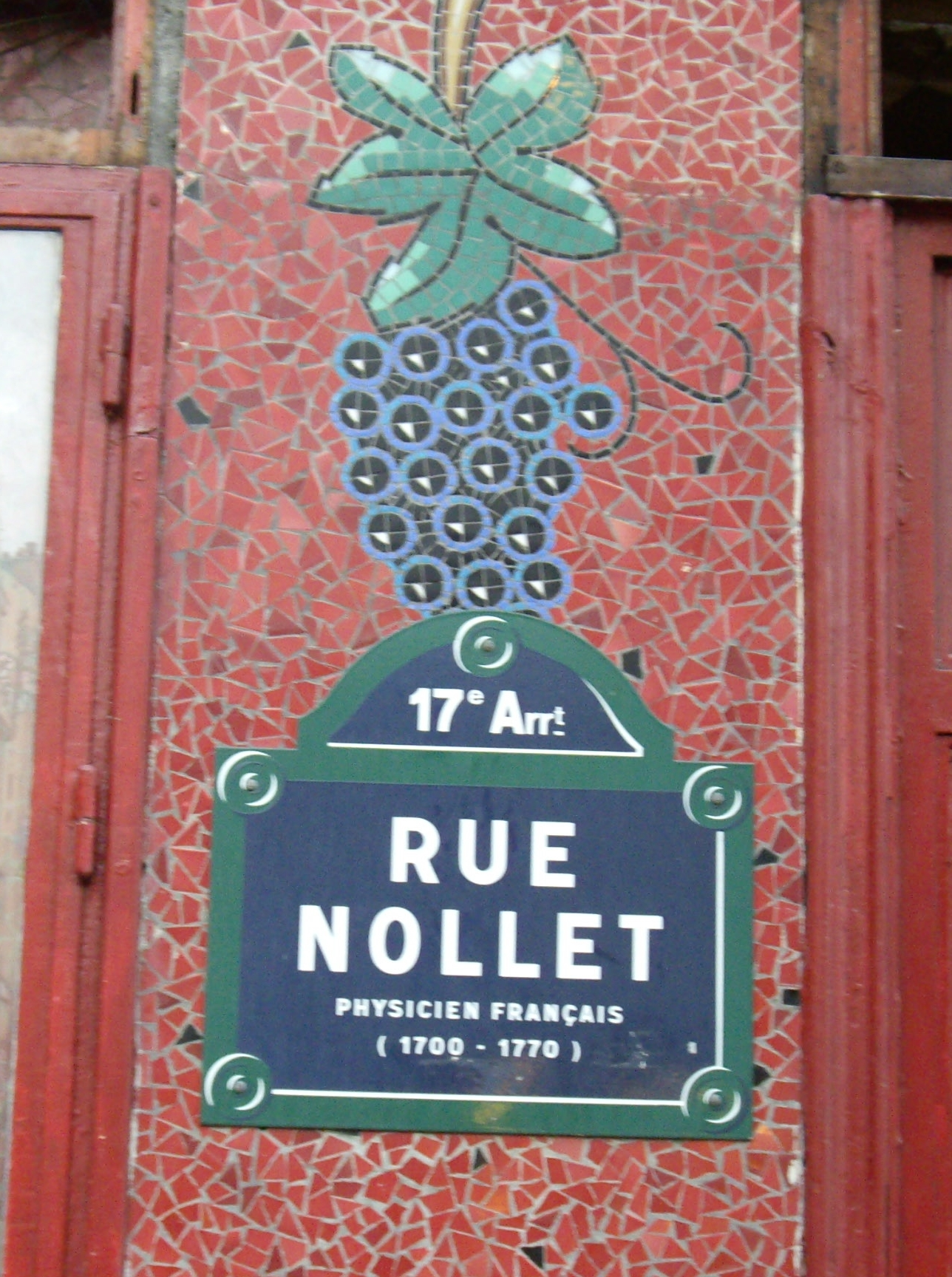 Plaque de la rue Nollet, Paris 17e, en mémoire du physicien Jean-Antoine Nollet (1700-1770).